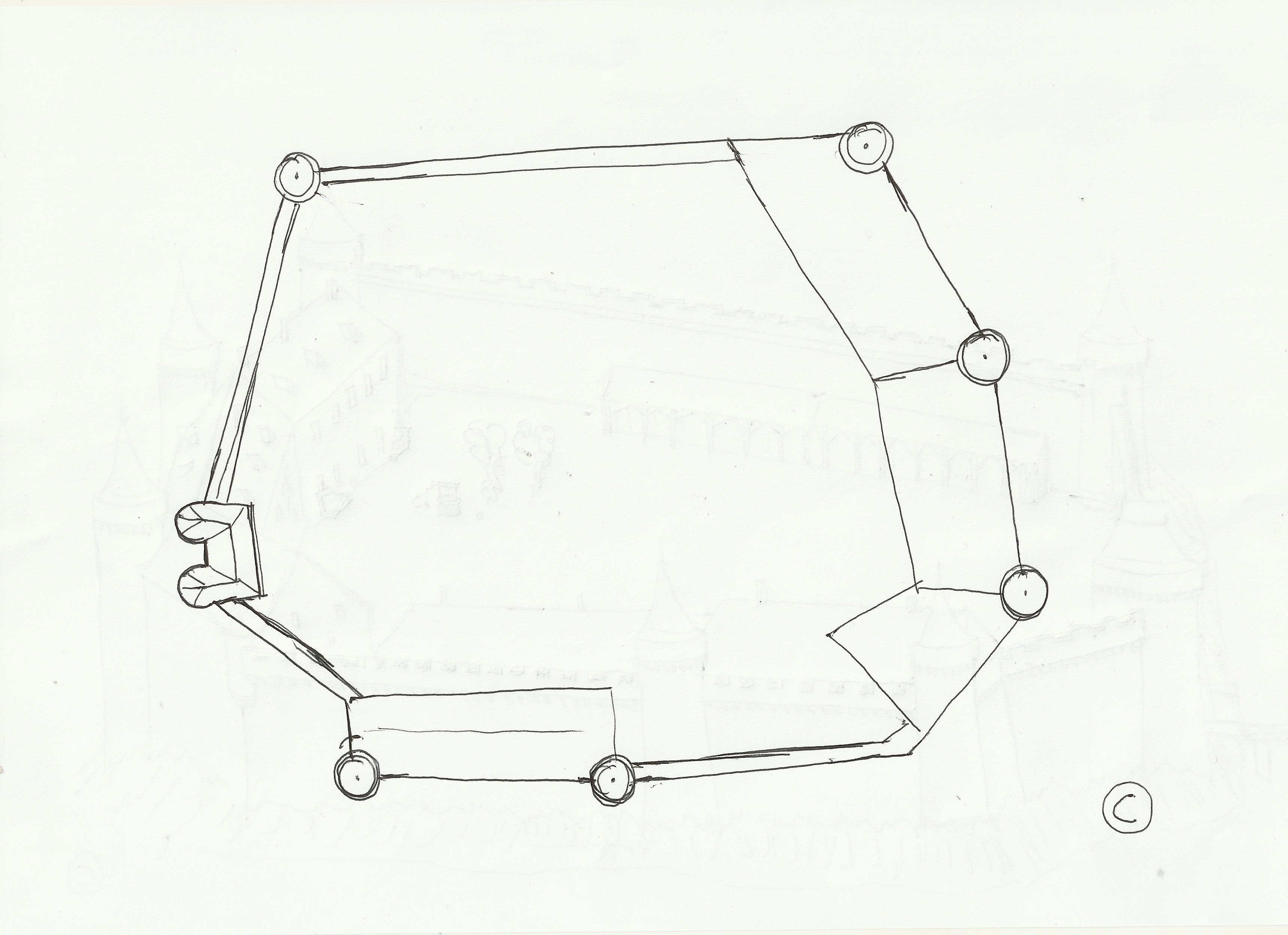 Plan possible du château de la Garnache, établi par analyse du plan de Mathieu Mérian datant de 1660.